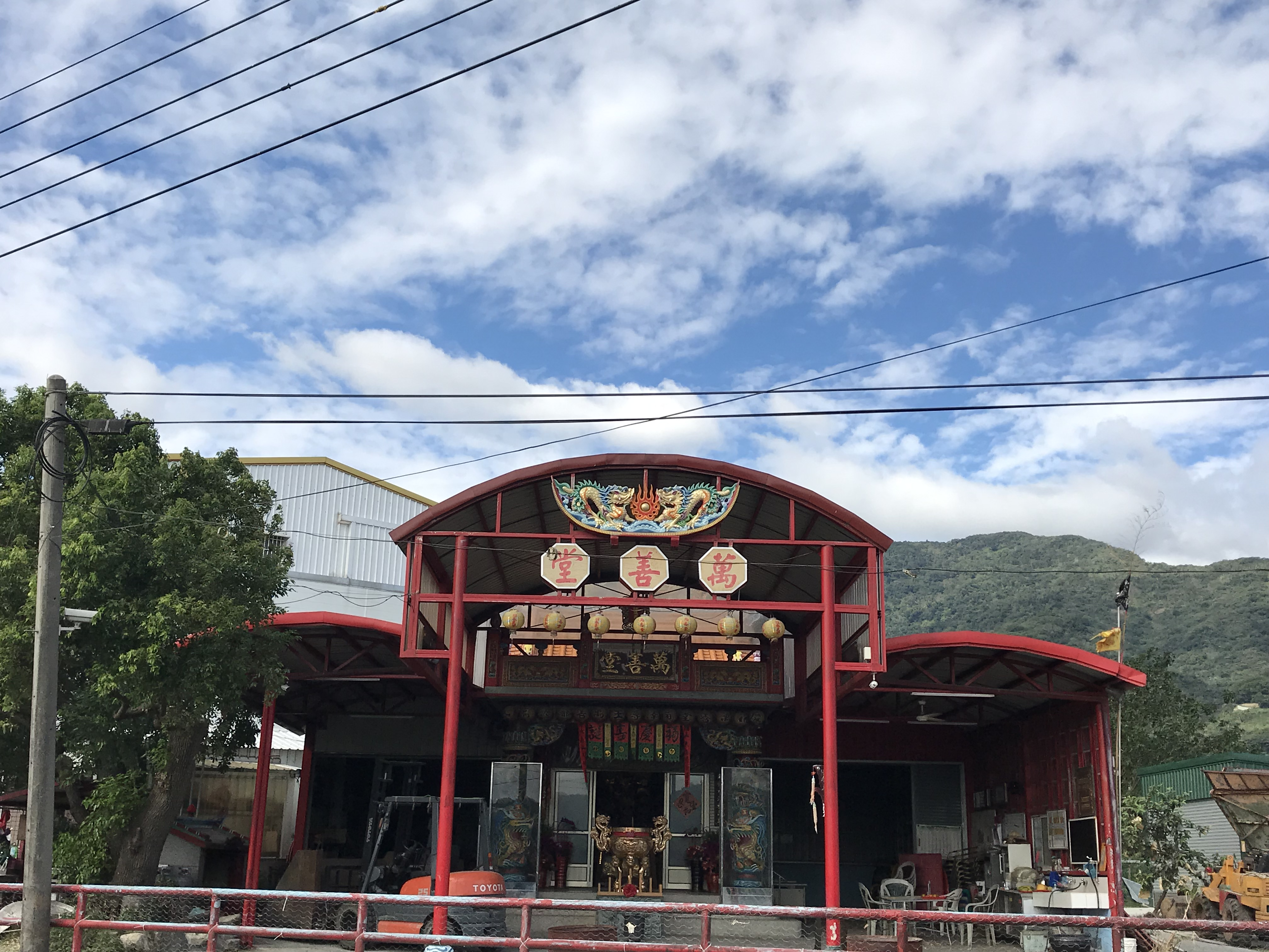 臺灣臺東縣卑南鄉斑鳩萬善堂